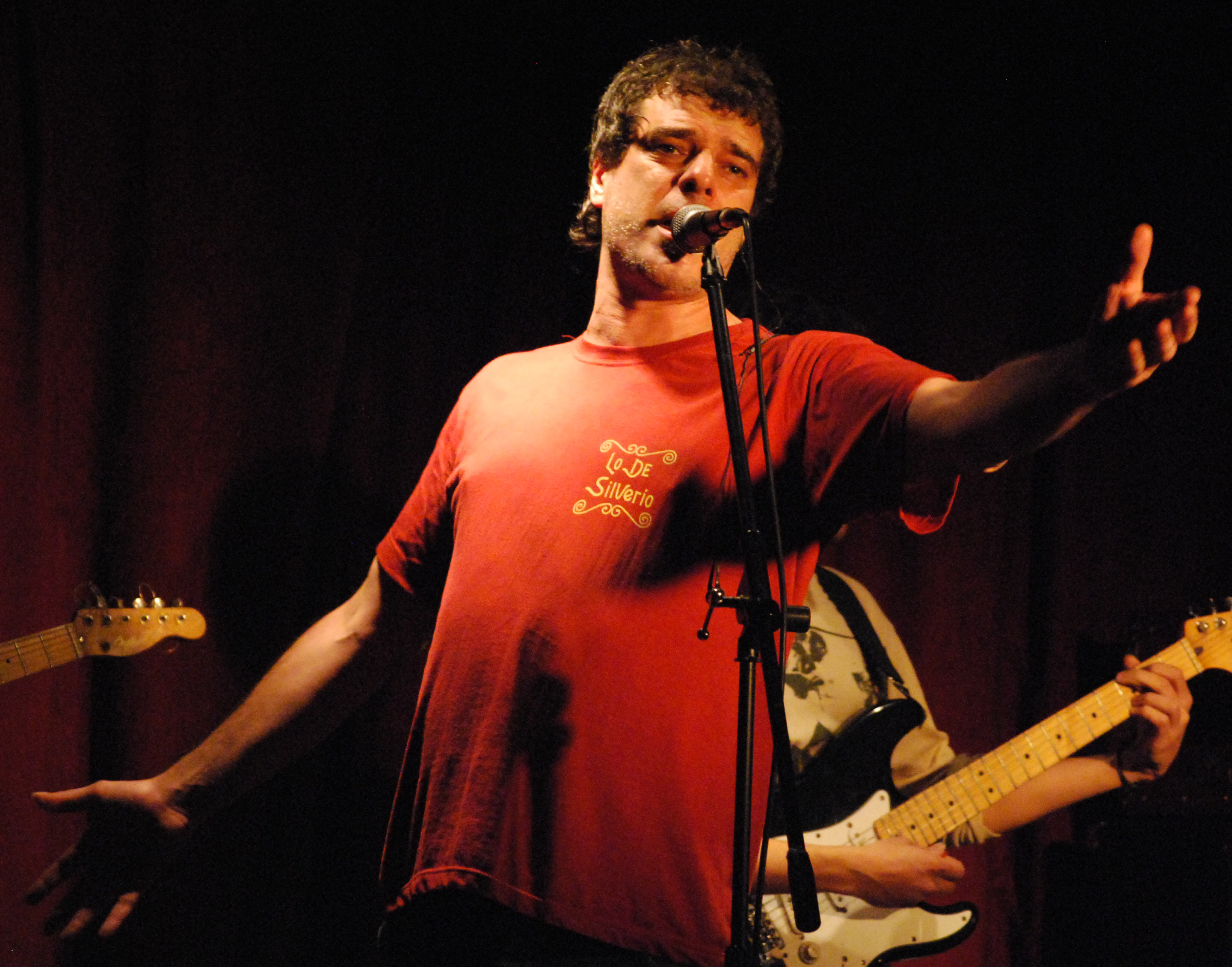 El músico uruguayo Alejandro Balbis, en un espectáculo brindado en Espacio Guambia (Montevideo - Uruguay).